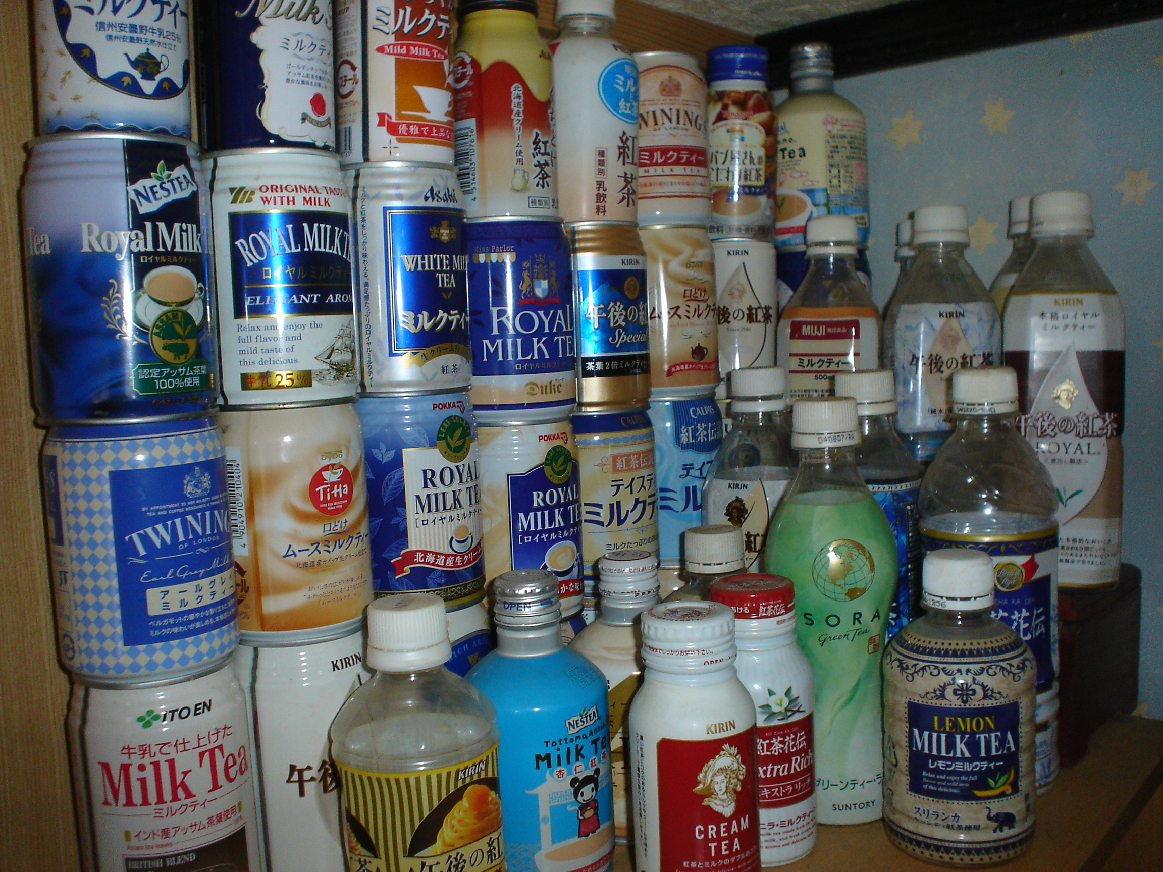 ミルクティーの缶やペットボトル